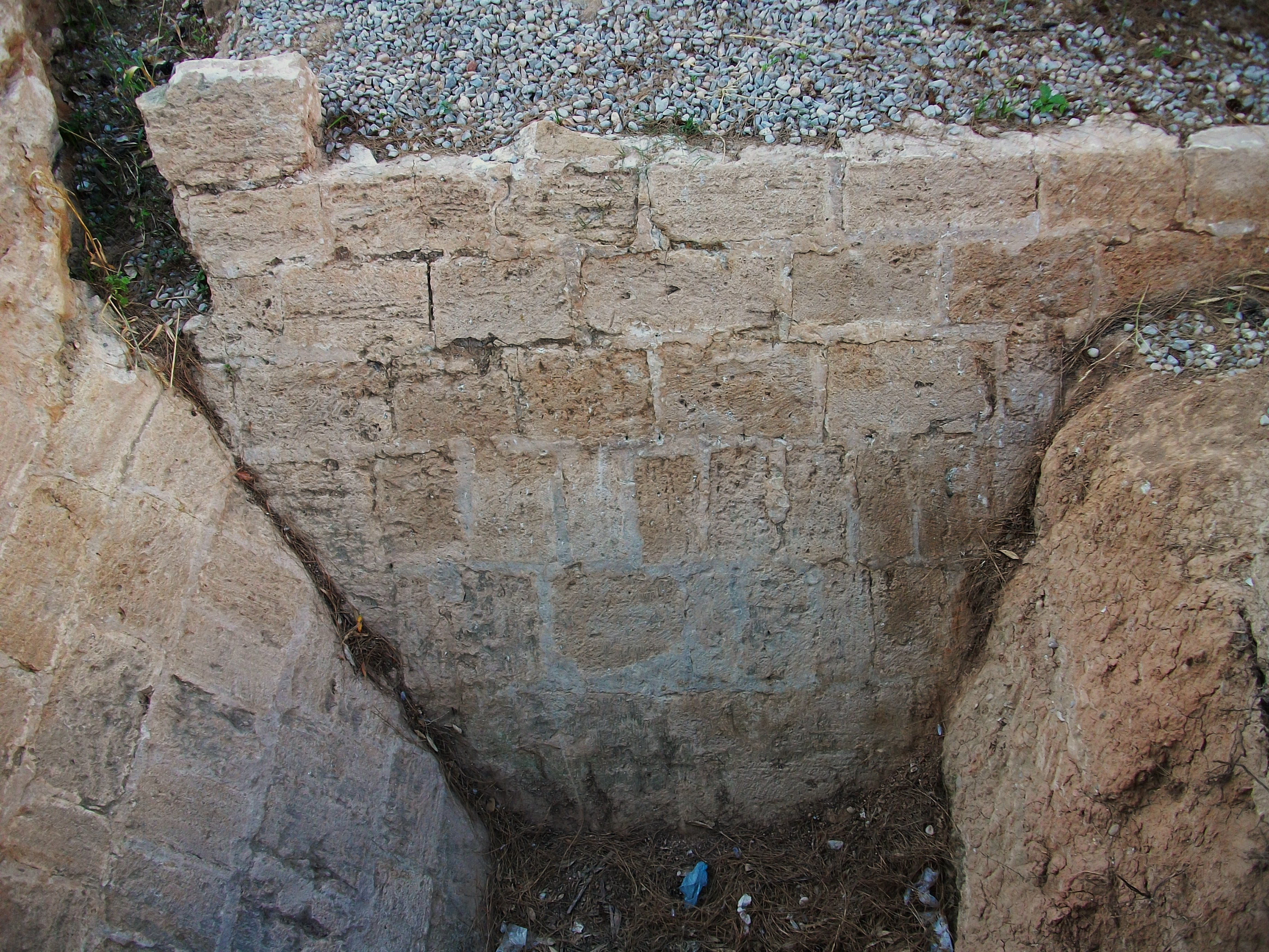 Vall o fossat del palau del Real de València. El desenvolupament dels treballs arqueològics ha pogut constatar la construcció d'un vall o fossat del que només es tenien notícies documentals, però no apareixia en els plànols existents del palau. La construcció d'aquest element constructiu, a partit de 1356, està relacionada amb els preparatius per a la guerra contra Castella (1356-1375), de manera coetània a la construcció de les noves muralles de la ciutat. Durant el setge de València per les tropes castellanes el 1364 el palau del Real fou parcialment destruït. El vall es va començar a excavar en el terreny natural i es va folrar amb pedra picada col·locada a os amb encintat, dotant-lo amb una escarpa monumental de pedra similar a la que es pot observar a les torres de Serrans. Passat el perill bèl·lic, el vall va ser utilitzat de manera parcial com a estany fins el seu farciment en època d'Alfons el Magnànim.